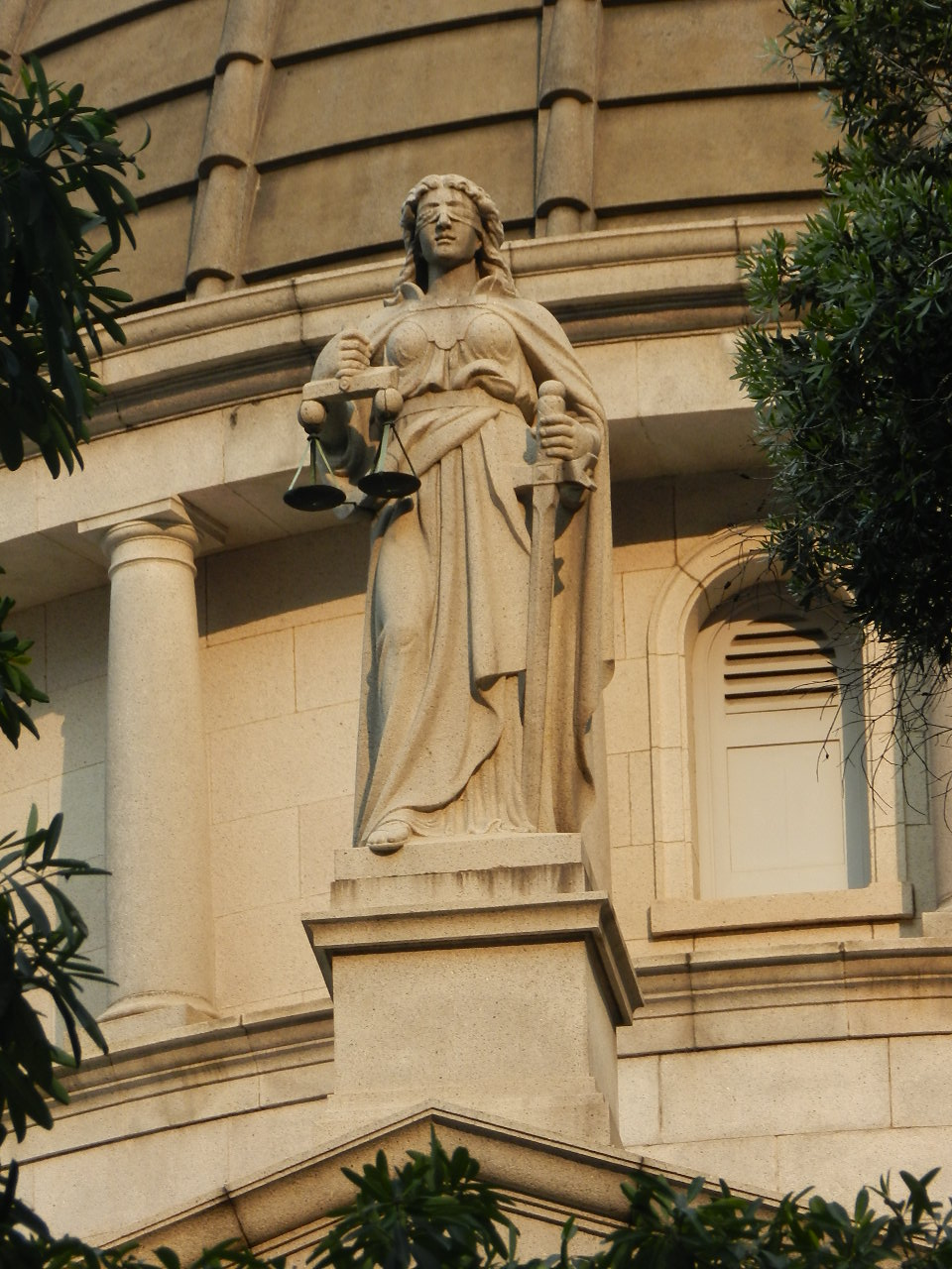 中文（香港）: 泰美斯女神像, 前立法會大樓, 香港